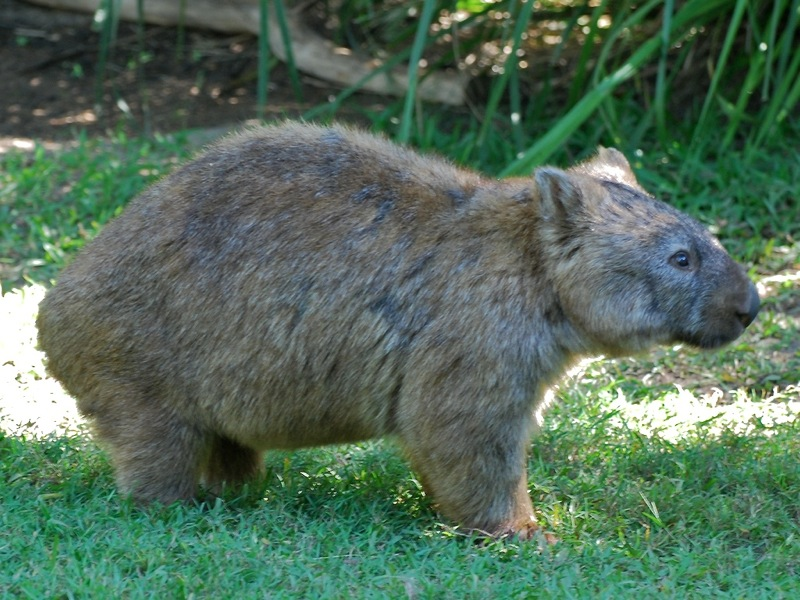 wombat